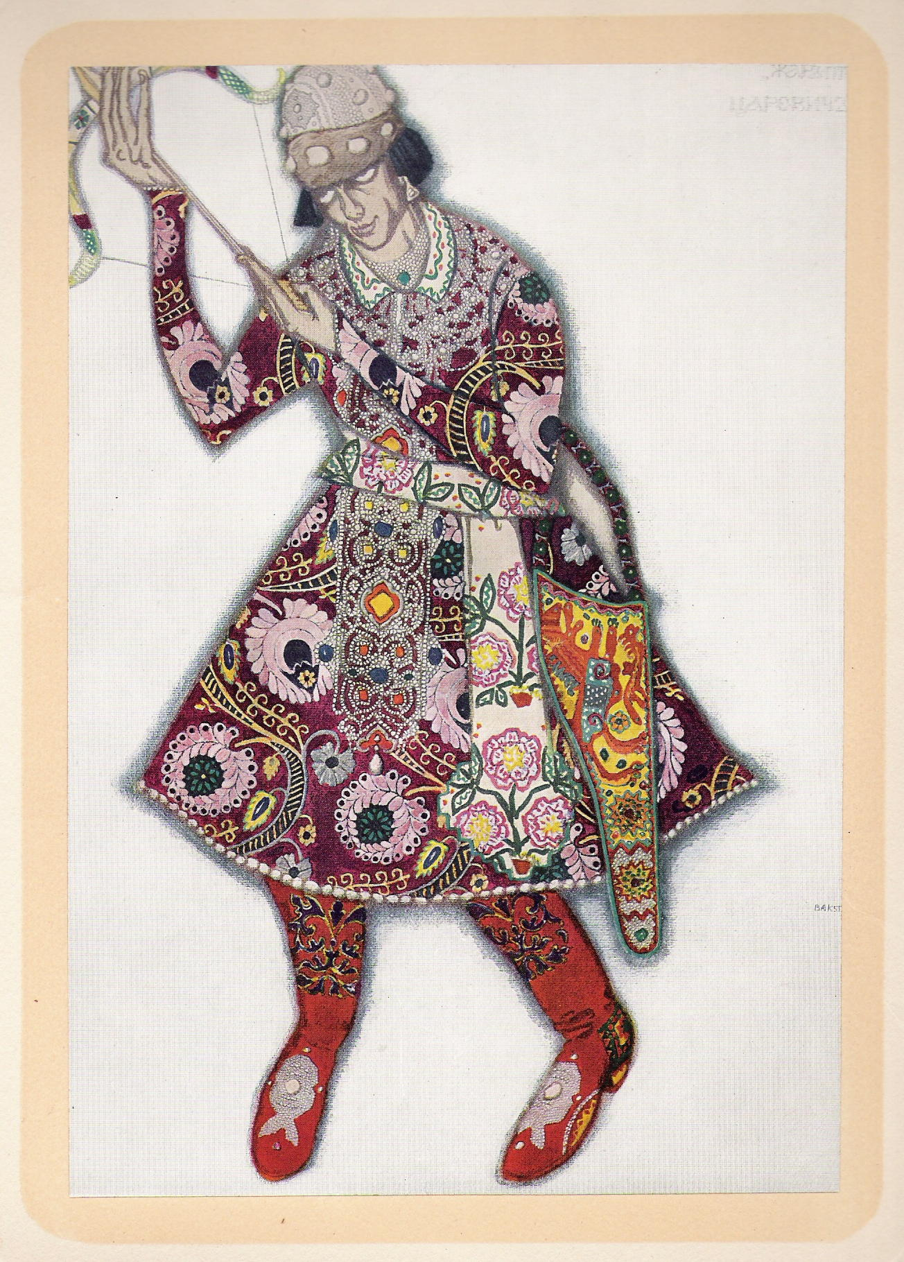 Léon Bakst, Oiseau de feu, 1913 Костюм Михаила Фокина в роли Царевича. Жар-птица. 1910